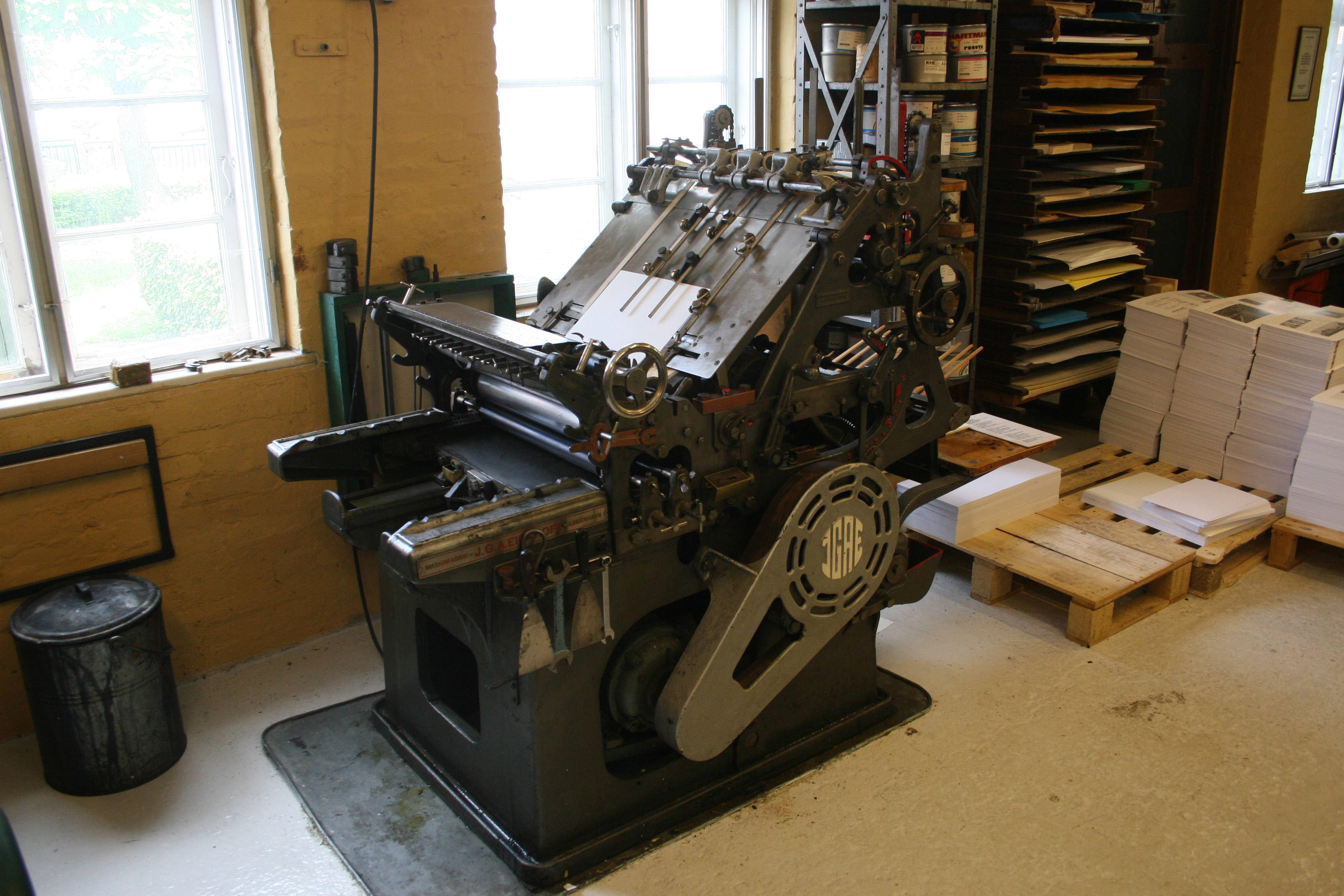 Eickhoff Stopcylinderautomat Model OOC, Bogtrykmuseet i Esbjerg